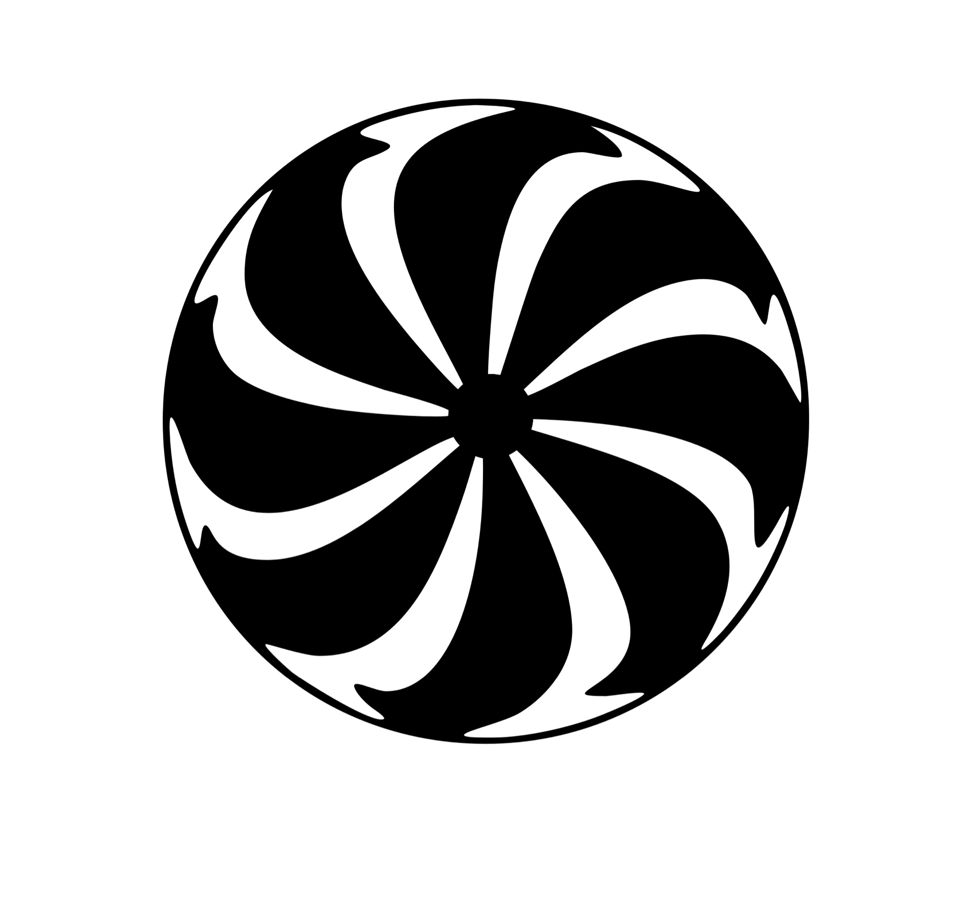 Դարչնագույն արևախաչ